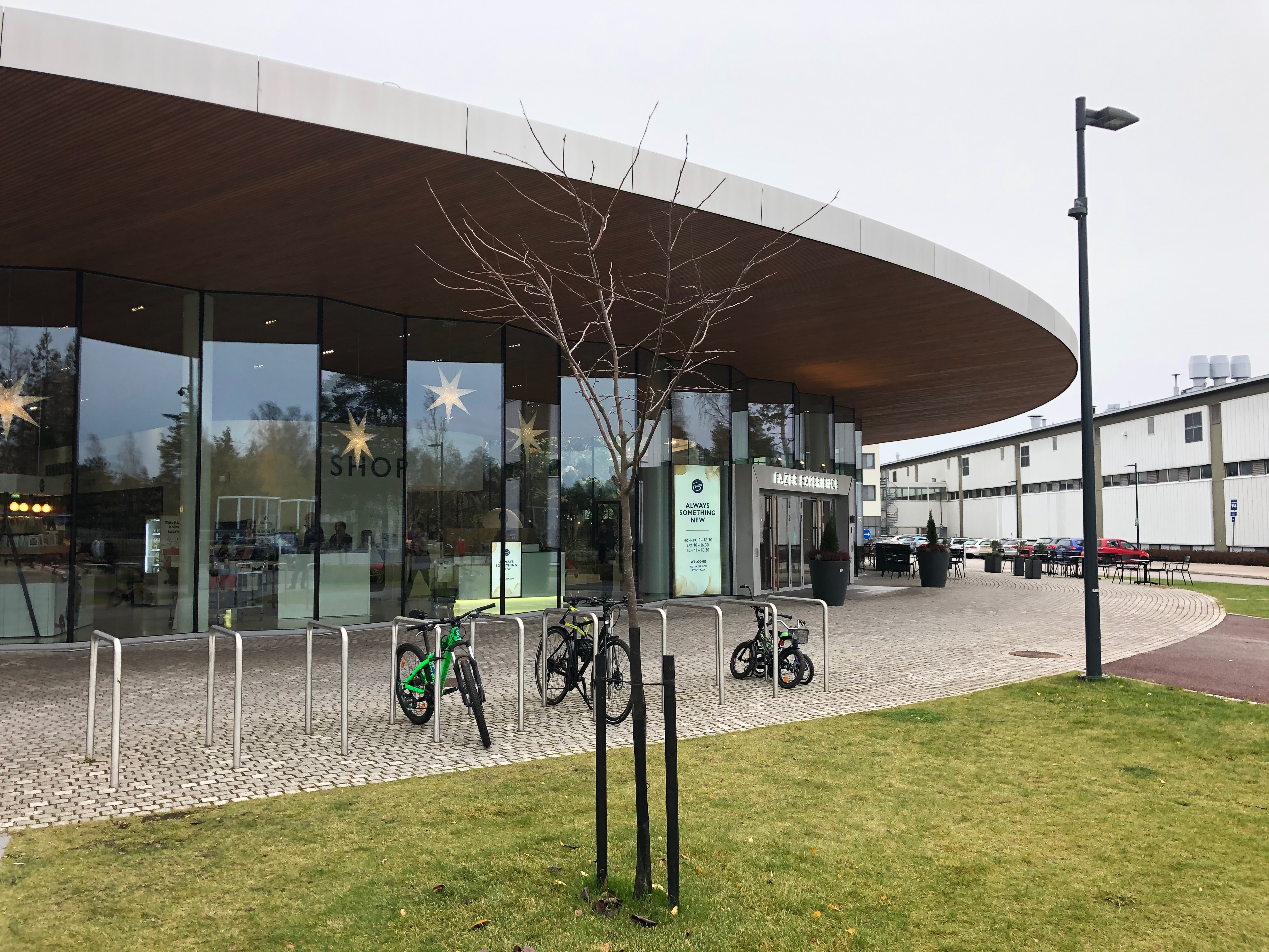 Визит центр фабрики Фазер